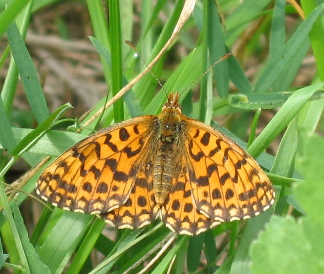 Boloria dia